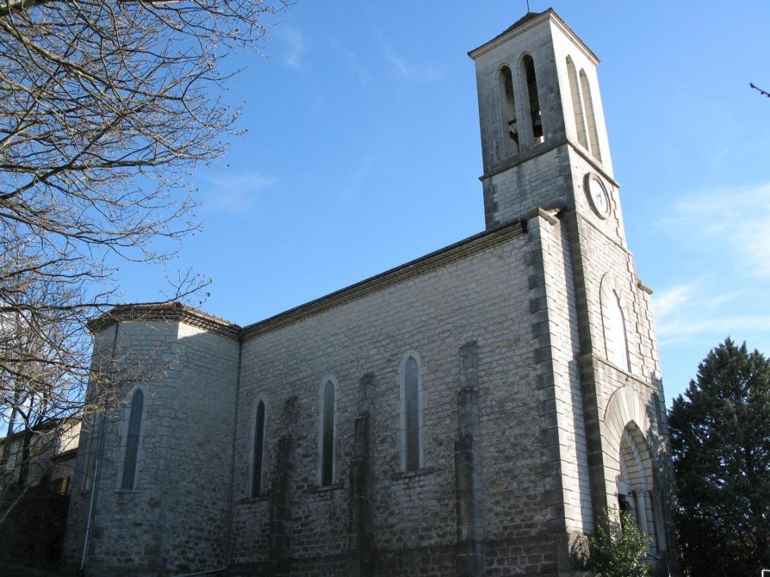 Balazuc